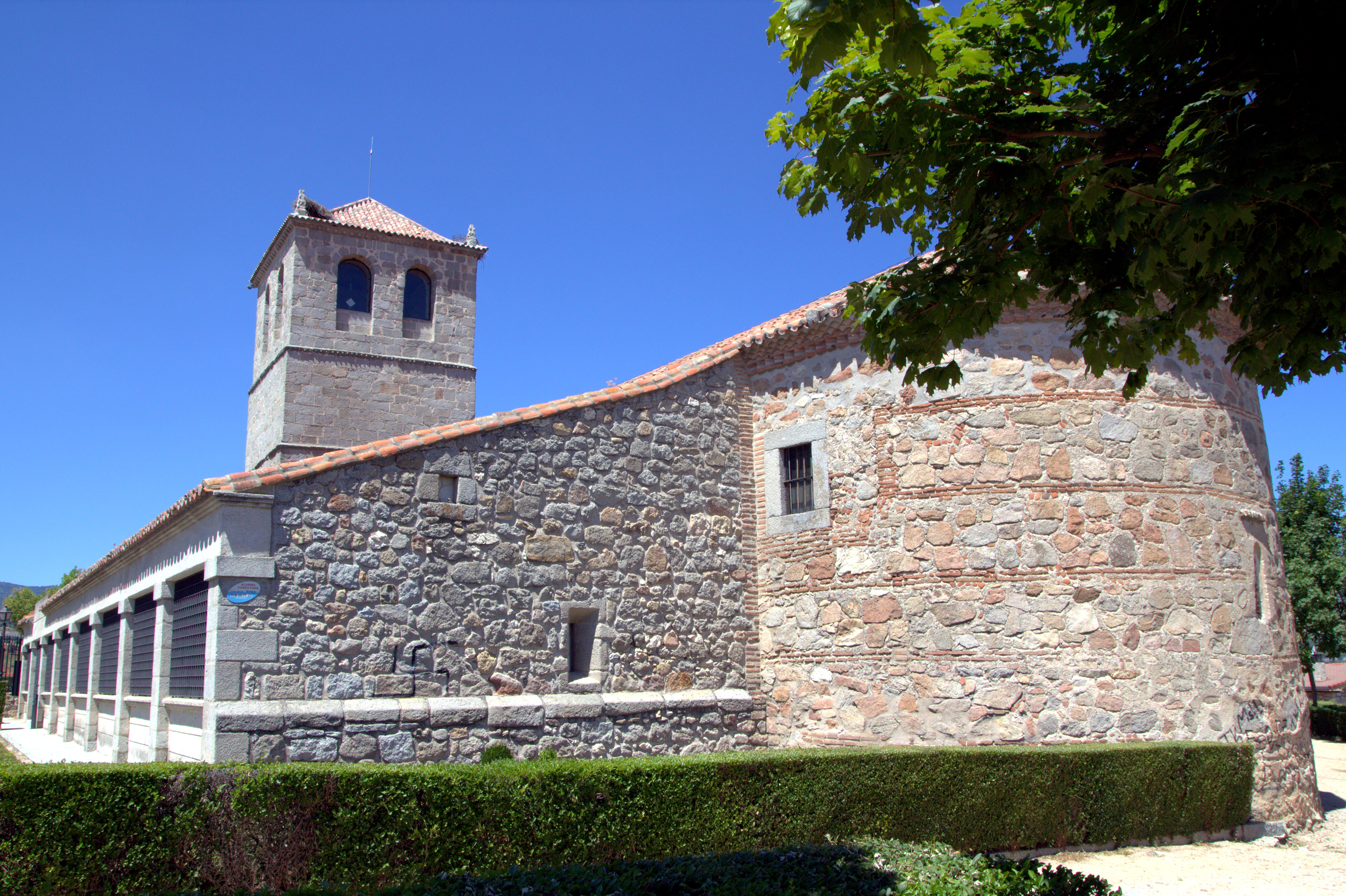 antigua iglesia de Guadarrama hoy centro de cultura